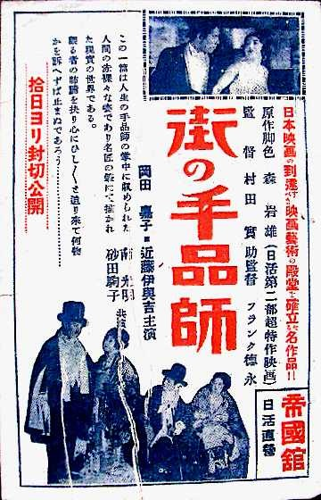 『街の手品師』、日活、1925年